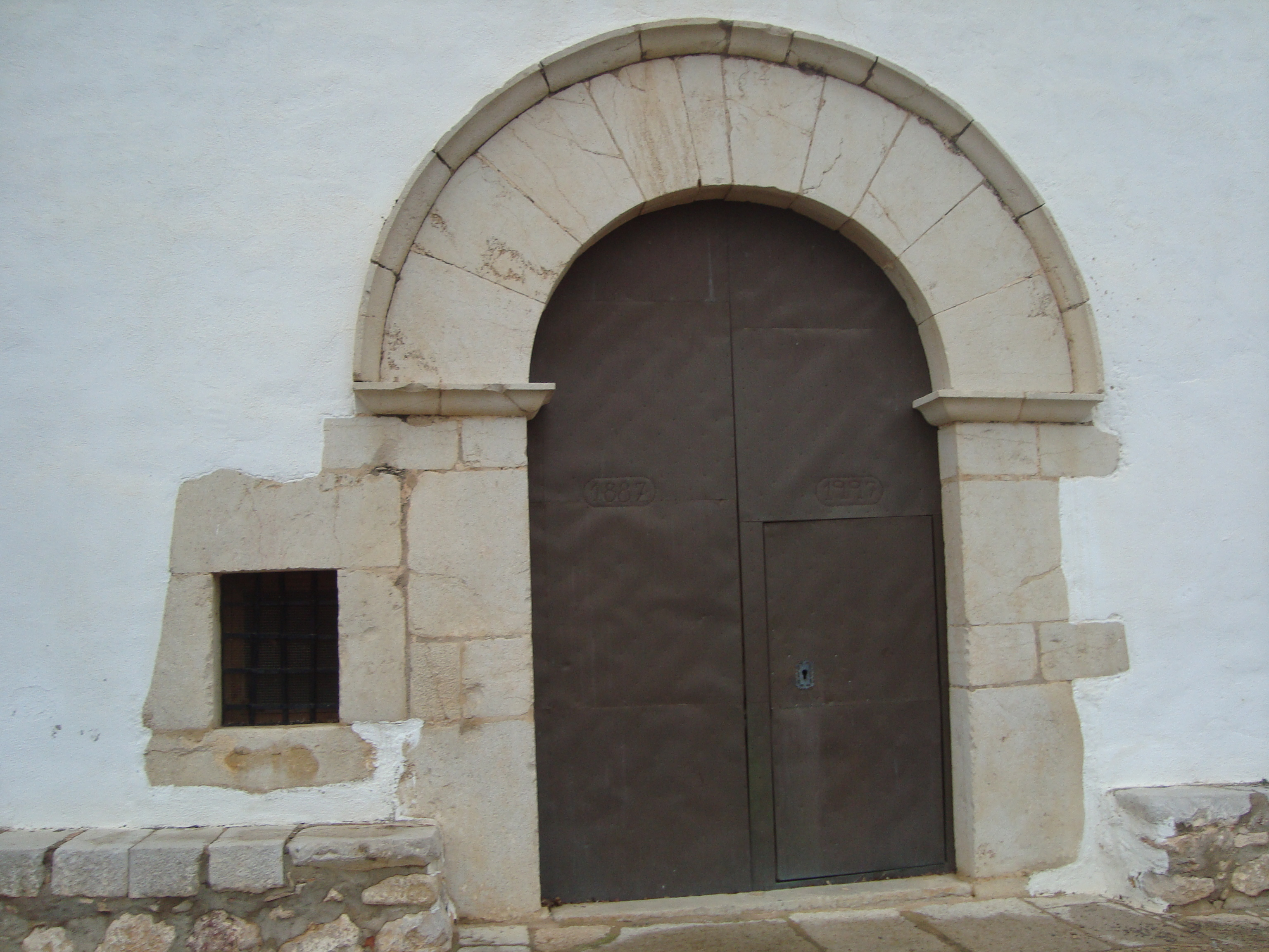 Puerta y arcada de piedra de la ermita de San Vicente Ferrer de les Coves de Vinromà, Castelló